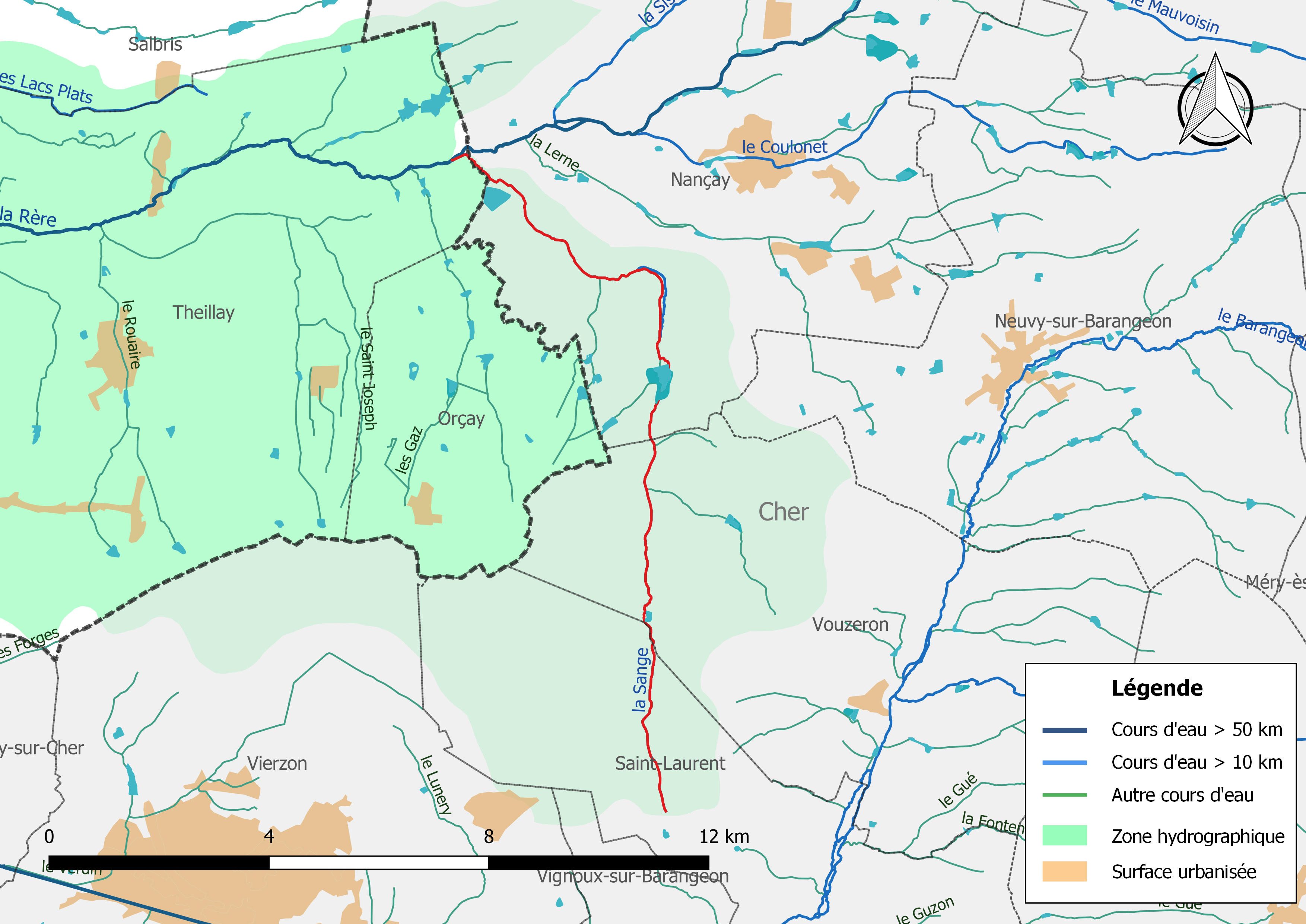 Carte du cours d'eau « le Breuil » et de son bassin versant (zone hydrographique dans laquelle il s'insère), en Loir-et-Cher (France).